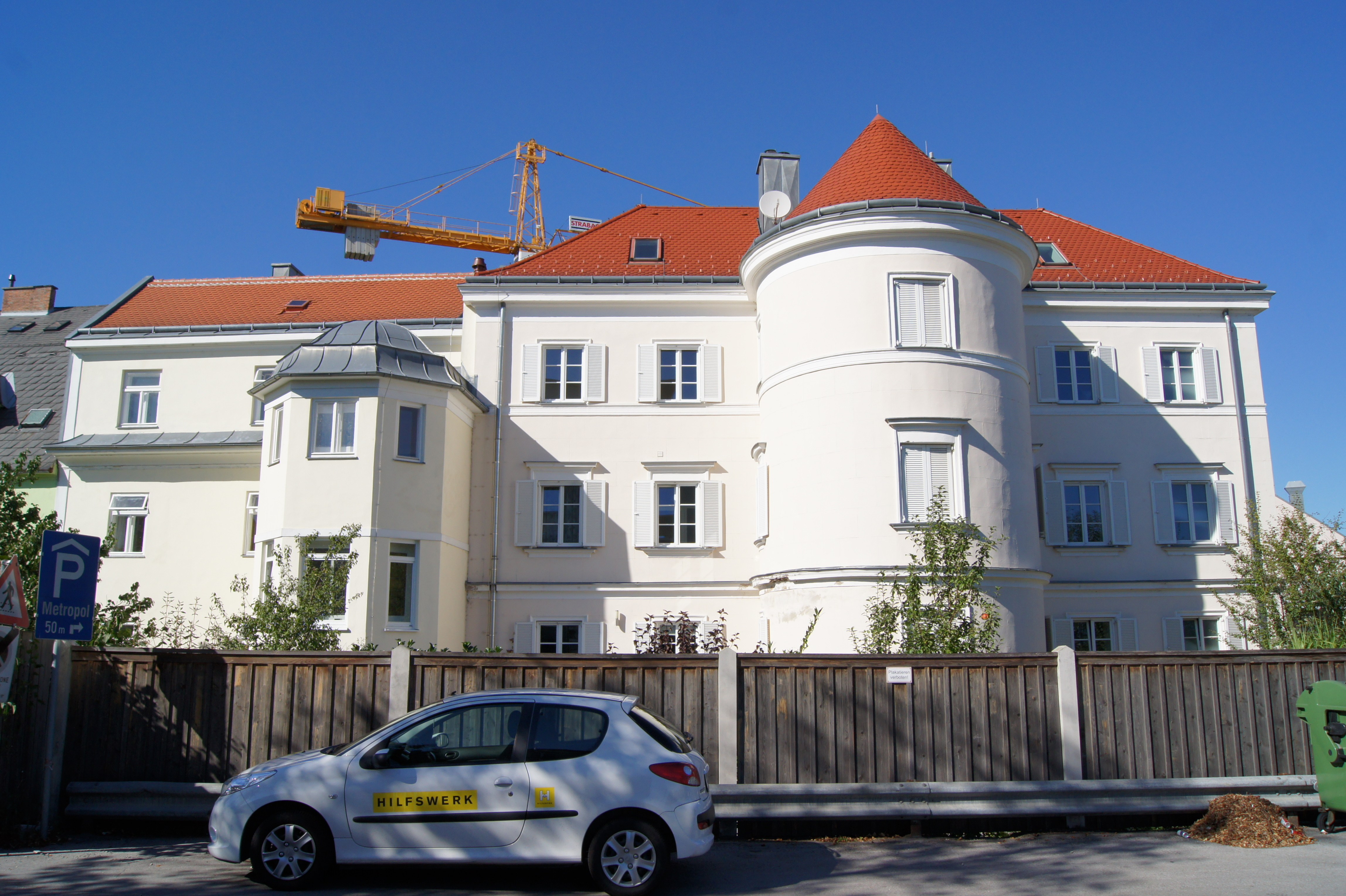 Wohnhaus und Teile der ehemaligen Stadtmauer der Dr. Karl Renner-Promenade 23 in St. Pölten